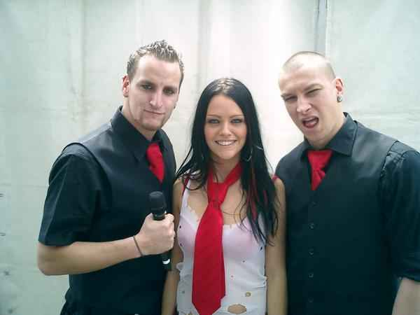 Letzte Besetzung vor der Auflösung: Markus, Kris und Pat